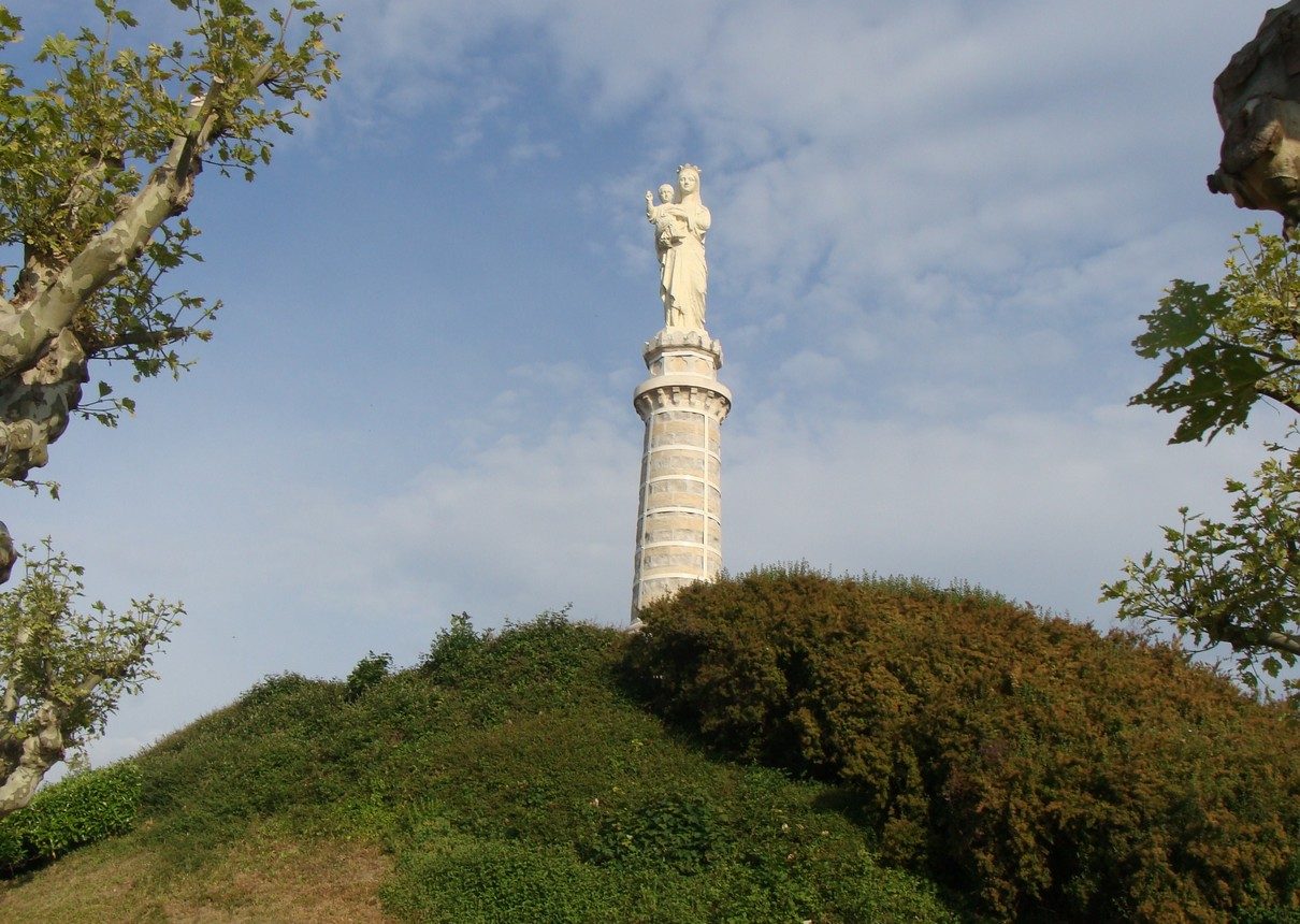 La statue de la Vierge à l'enfant sur la butte voisine de la chapelle Saint-Barthélémy de Montluel.